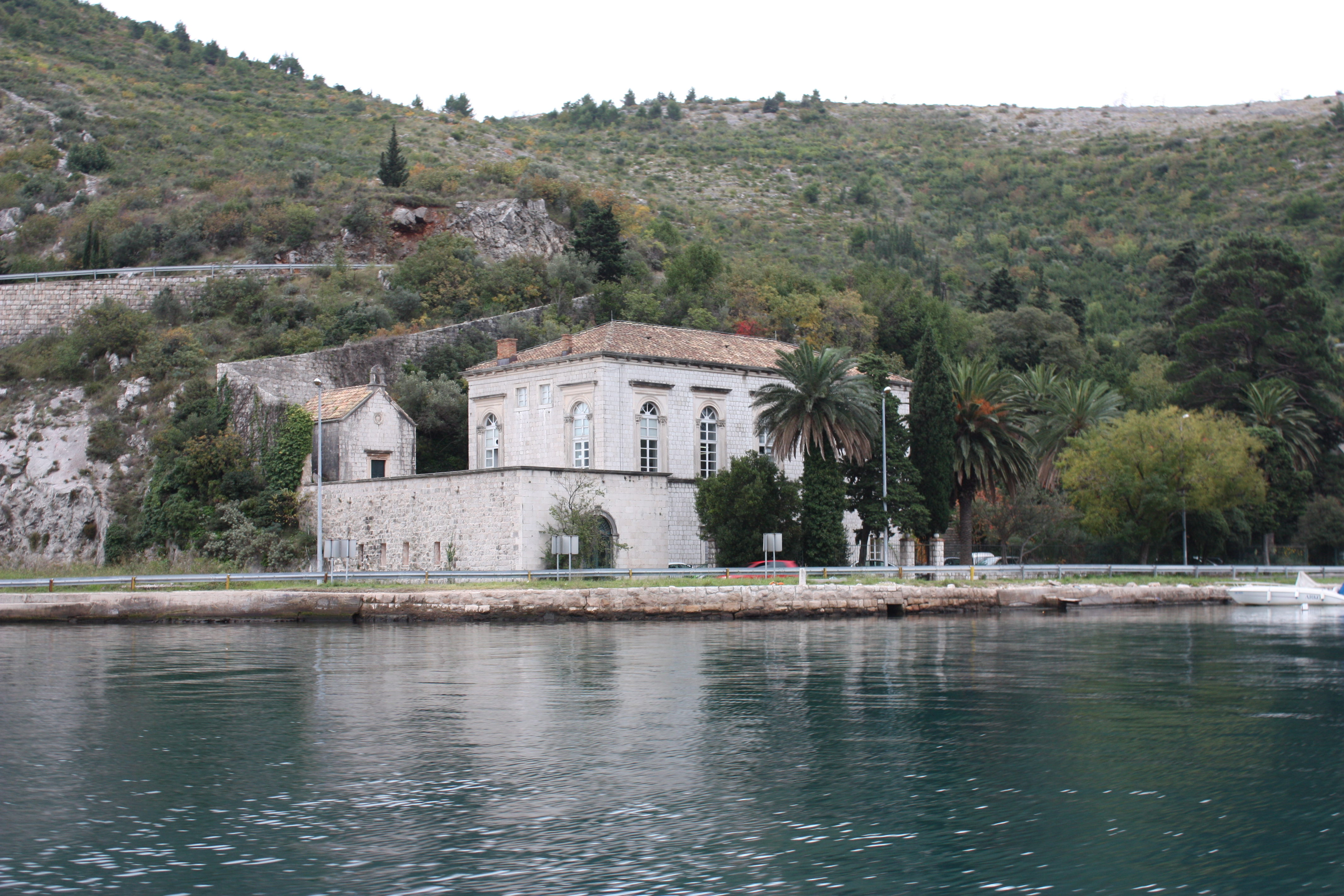 Ljetnikovac Kaboga kod Dubrovnika